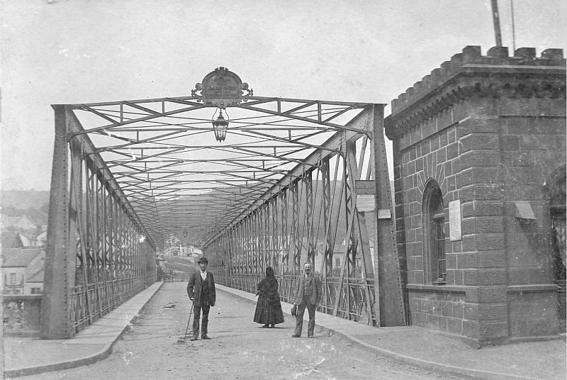 Die erste Brücke in Mettlach im Jahre 1896 (Blick in Richtung Keuchingen). Die Brücke wurde 1886 von Villeroy & Boch erbaut und war zunächst mautpflichtig. 1937 wurde die Brücke durch eine neue ersetzt, da sie dem erhöhten Verkehrsaufkommen nicht mehr gewachsen war. Die neu erbaute Brücke wurde im Zweiten Weltkrieg zerstört.